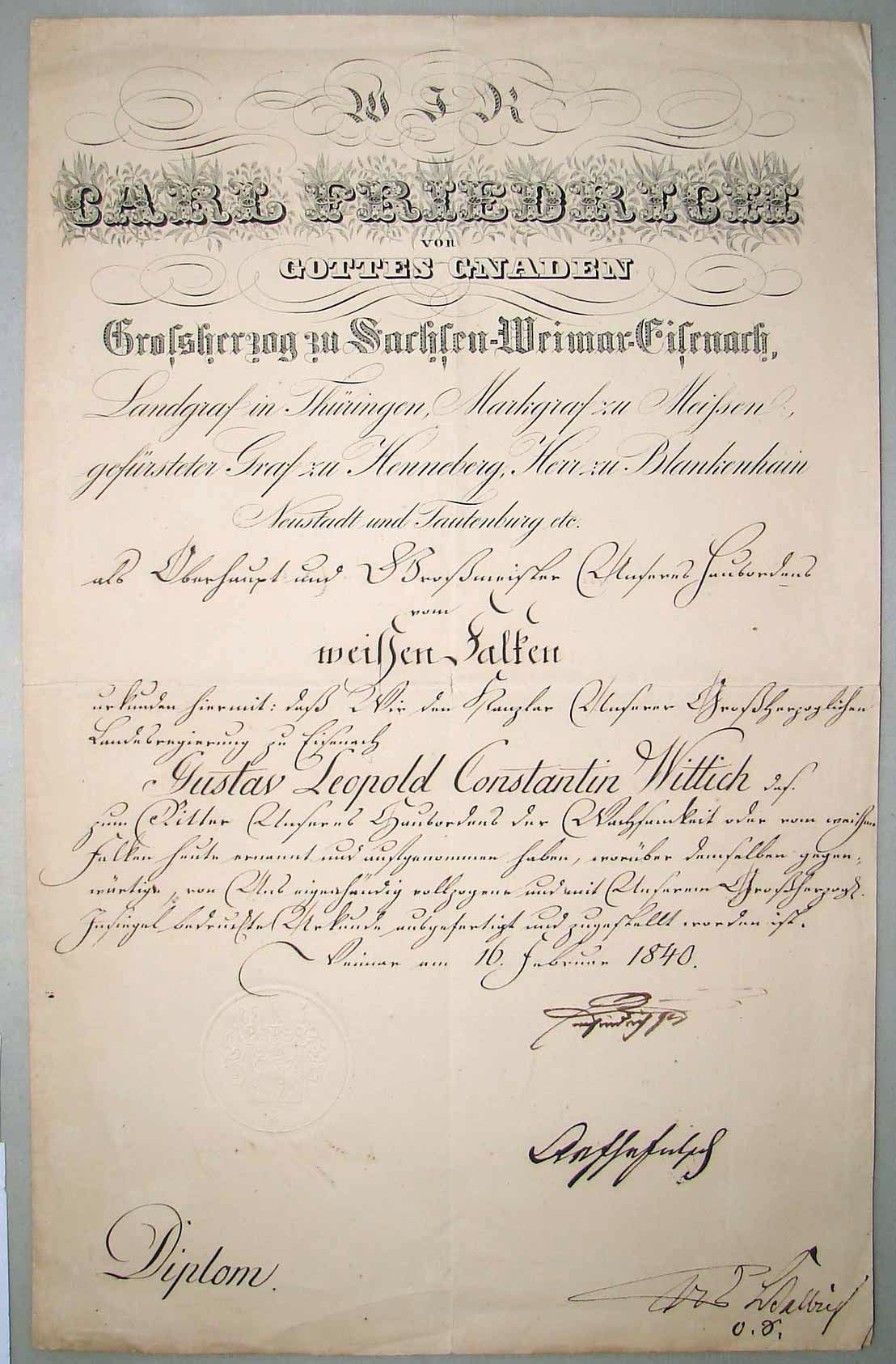 Verleihungsdiplom zum Ritter des Hausordens der Wachsamkeit oder vom weißen Falken: Wir, Carl Friedrich, von Gottes Gnaden Grossherzog zu Sachsen-Weimar-Eisenach, Landgraf in Thüringen, Markgraf zu Meissen, gefürsteter Graf zu Henneberg, Herr zu Blankenhain Neustadt und Tautenburg etc. als Oberhaupt und Großmeister Unseres Hausordens vom weißen Falken urkunden hiermit: daß Wir den Kanzler Unserer Großherzoglichen Landesregierung zu Eisenach Gustav Leopold Constantin Wittich zum Ritter Unseres Hausordens der Wachsamkeit oder vom weißen Falken heute ernannt und aufgenommen haben, worüber demselben gegen würtige, von Uns eigenhändig vollzogen und mit Unserem Großherzogl. Insiegel bedruckte Urkunde ausgefertigt und zugestellt worden ist. Weimar am 16. Februar 1840. Unterschrift: Carl Friedrich, zwei weitere Unterschriften. Diplom